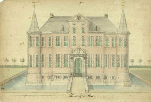 Das Gut Bodenhof in Aachen auf einer aquarellierten Bleistiftzeichnung